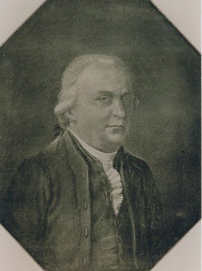 Herget Franz Anton Leonard